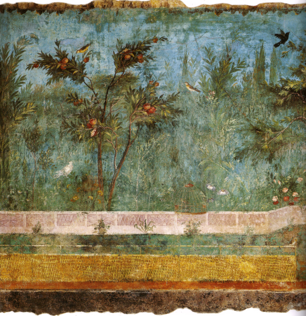 Villa di livia, affreschi di giardino, parete corta meridionale 01